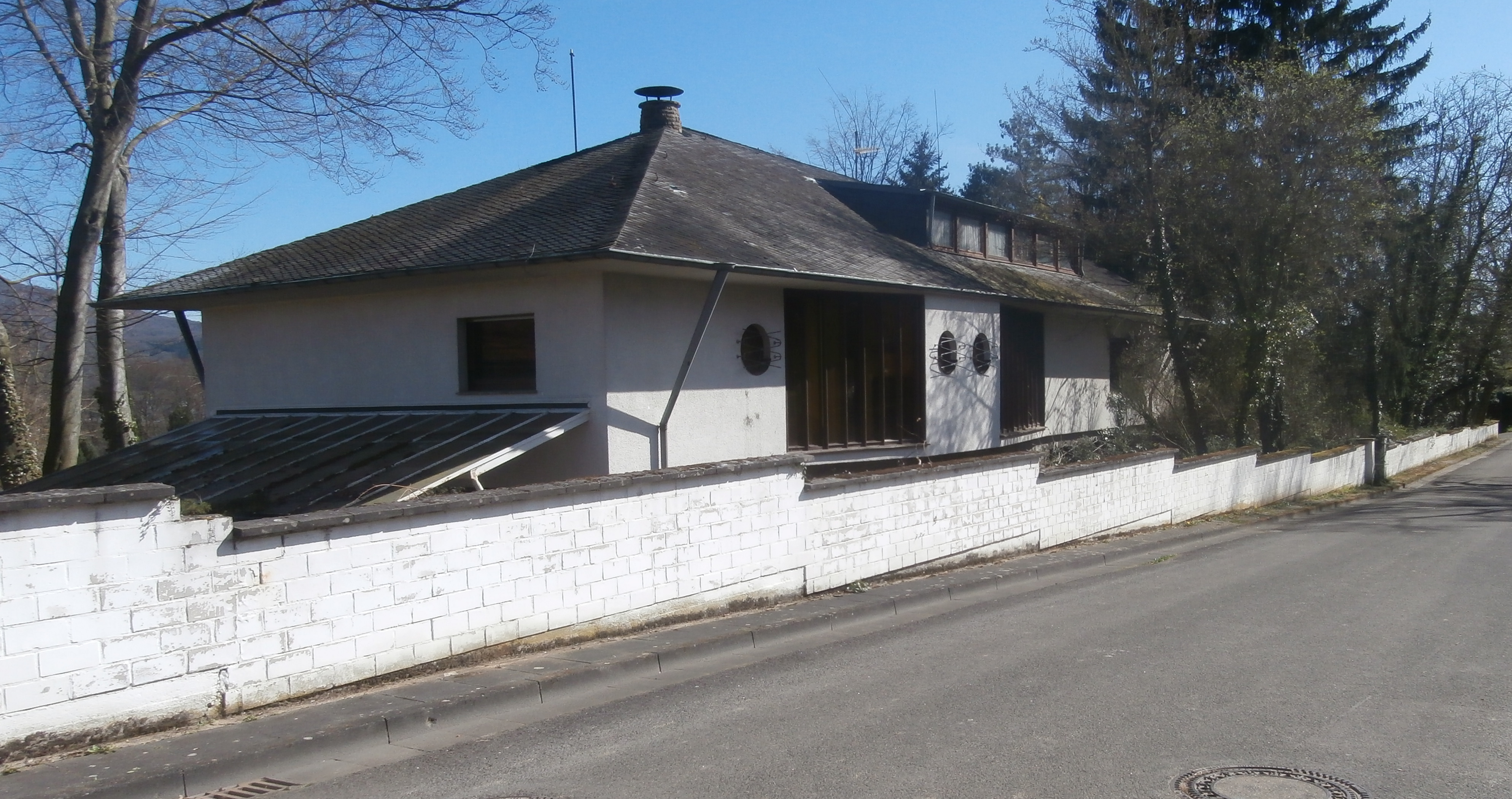 Ehemalige Kanzlei der Botschaft von Nepal, Im Hag 15, Mehlem, Bad Godesberg